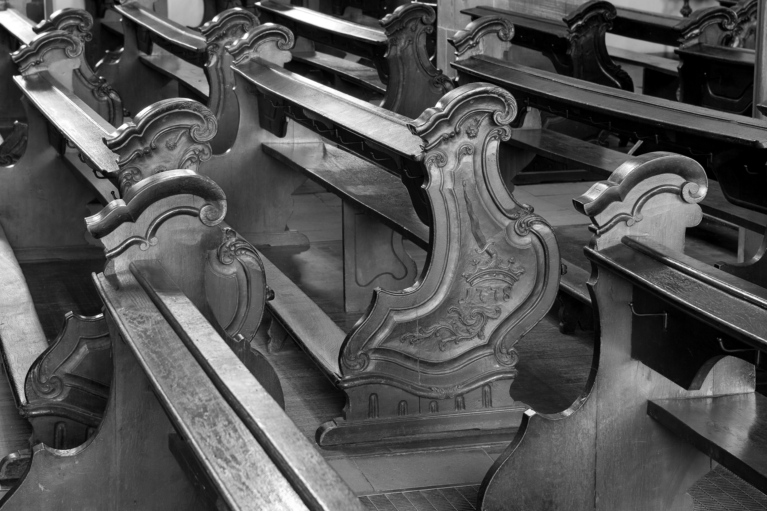 Spätbarockes Gestühl (1778, aus der ehemaligen Karmeliterkirche) in der Leonhardskirche in Frankfurt am Main. Selber fotografiert im März 2008, Doppellizensierung GFDL & CC-BY-SA 2.5.